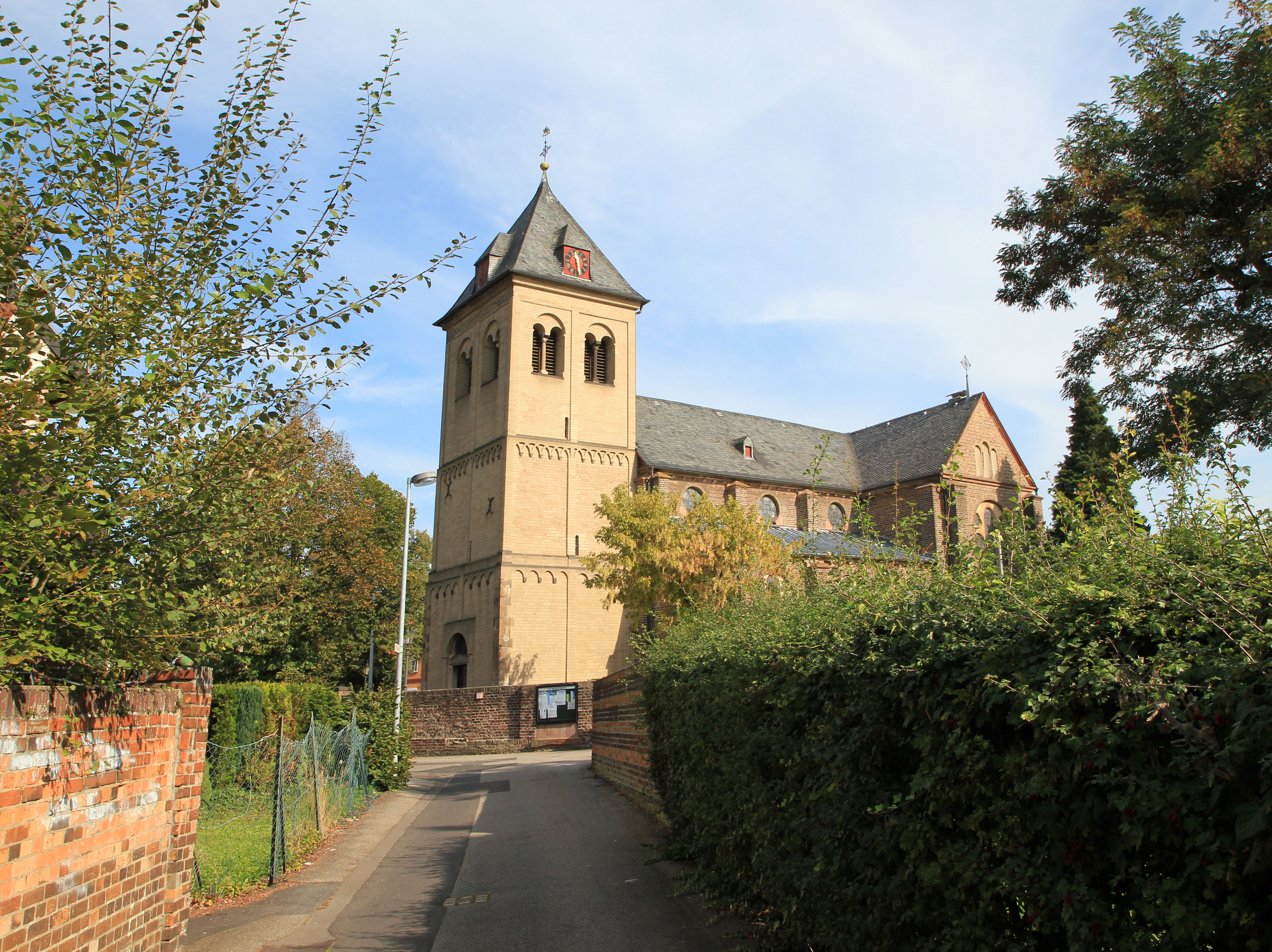 Erftstadt-Kierdorf, Pfarrkirche St. Martinus